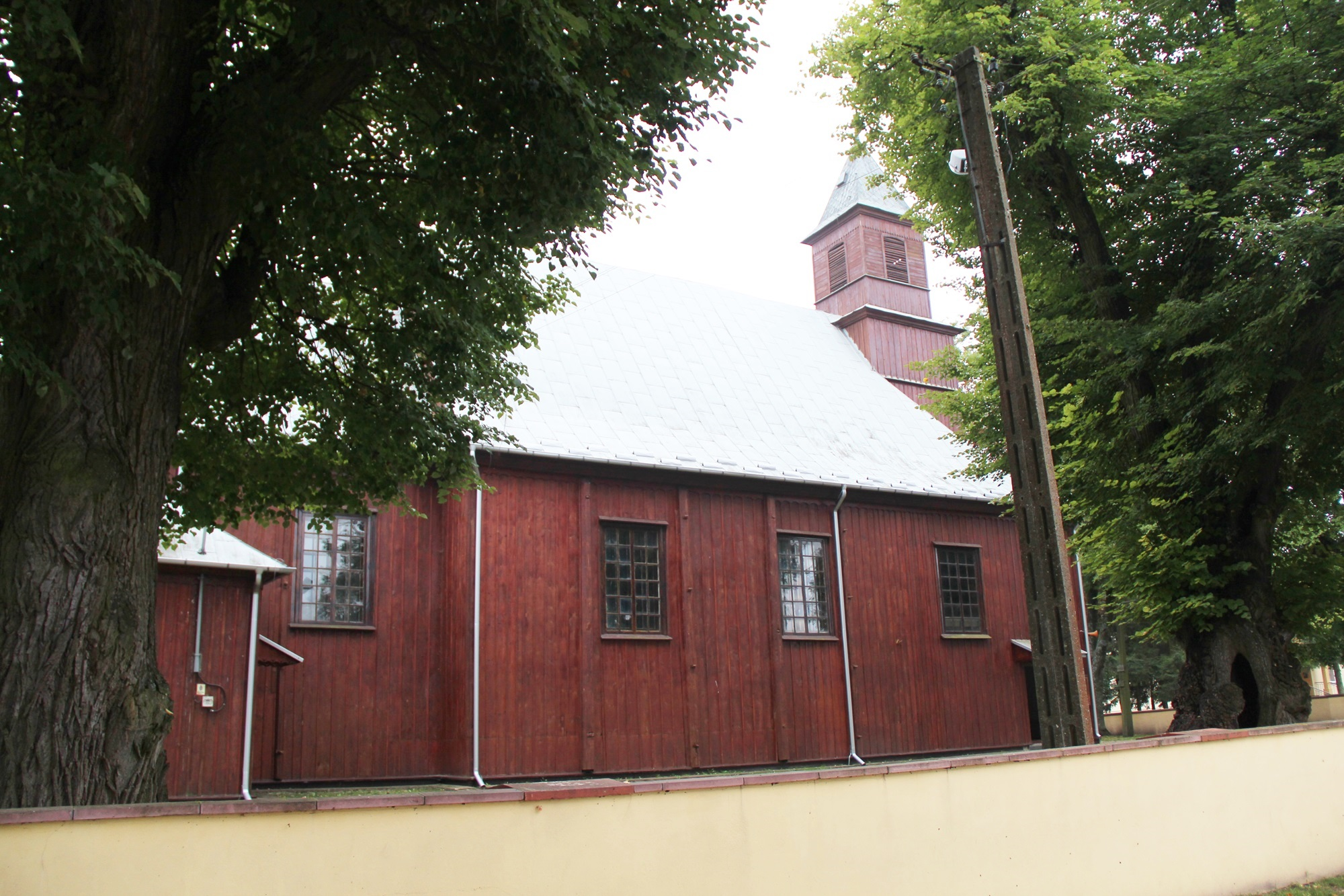 Wereszczyn - rzymskokatolicki kościół parafialny p.w. św. Stanisława Biskupa, 1783